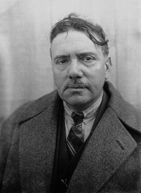 Reims : congrès radical socialiste : Durafour, député, anc. ministre : photographie de presse